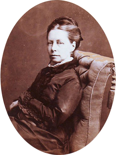 Portret van Maria Vos (1824-1906)